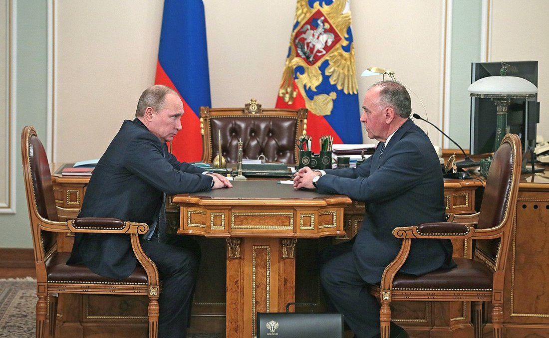 Владимир Путин с директором Федеральной службы по контролю за оборотом наркотиков Виктором Ивановым